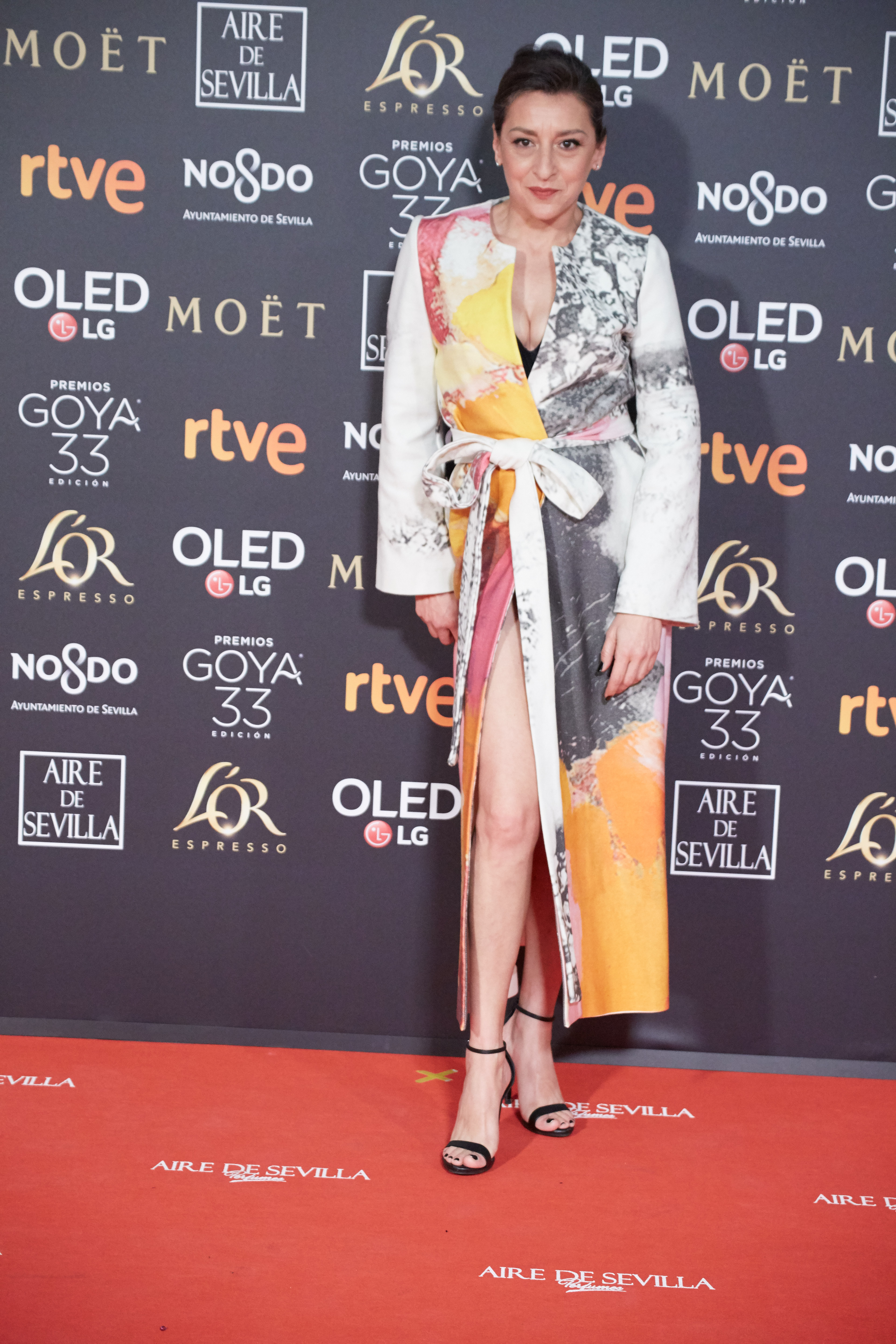 Mariola Fuentes en la alfombra roja de los Premios Goya celebrados en Sevilla en Febrero 2019